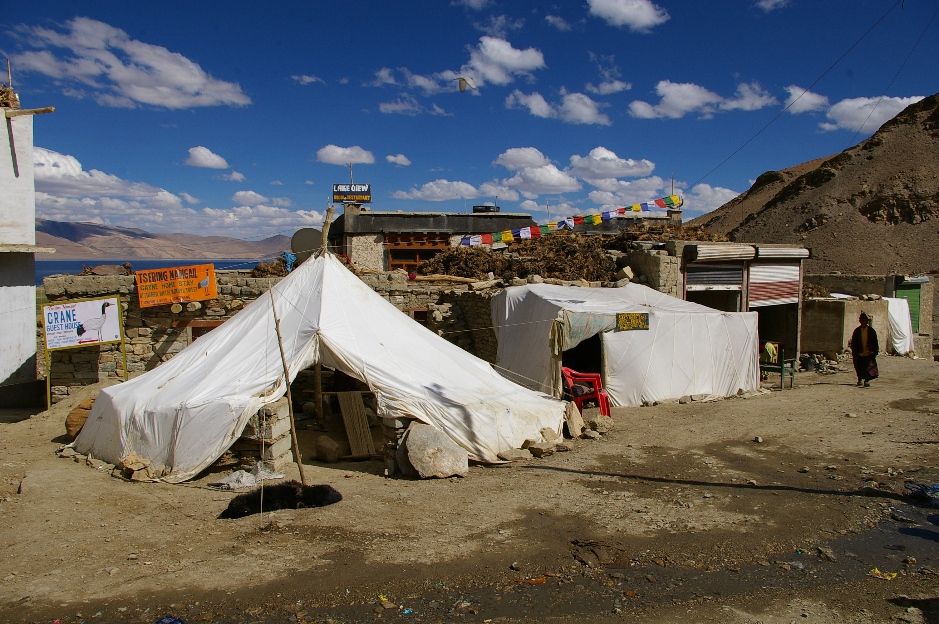 Korzok Monastery, Ladakh, India